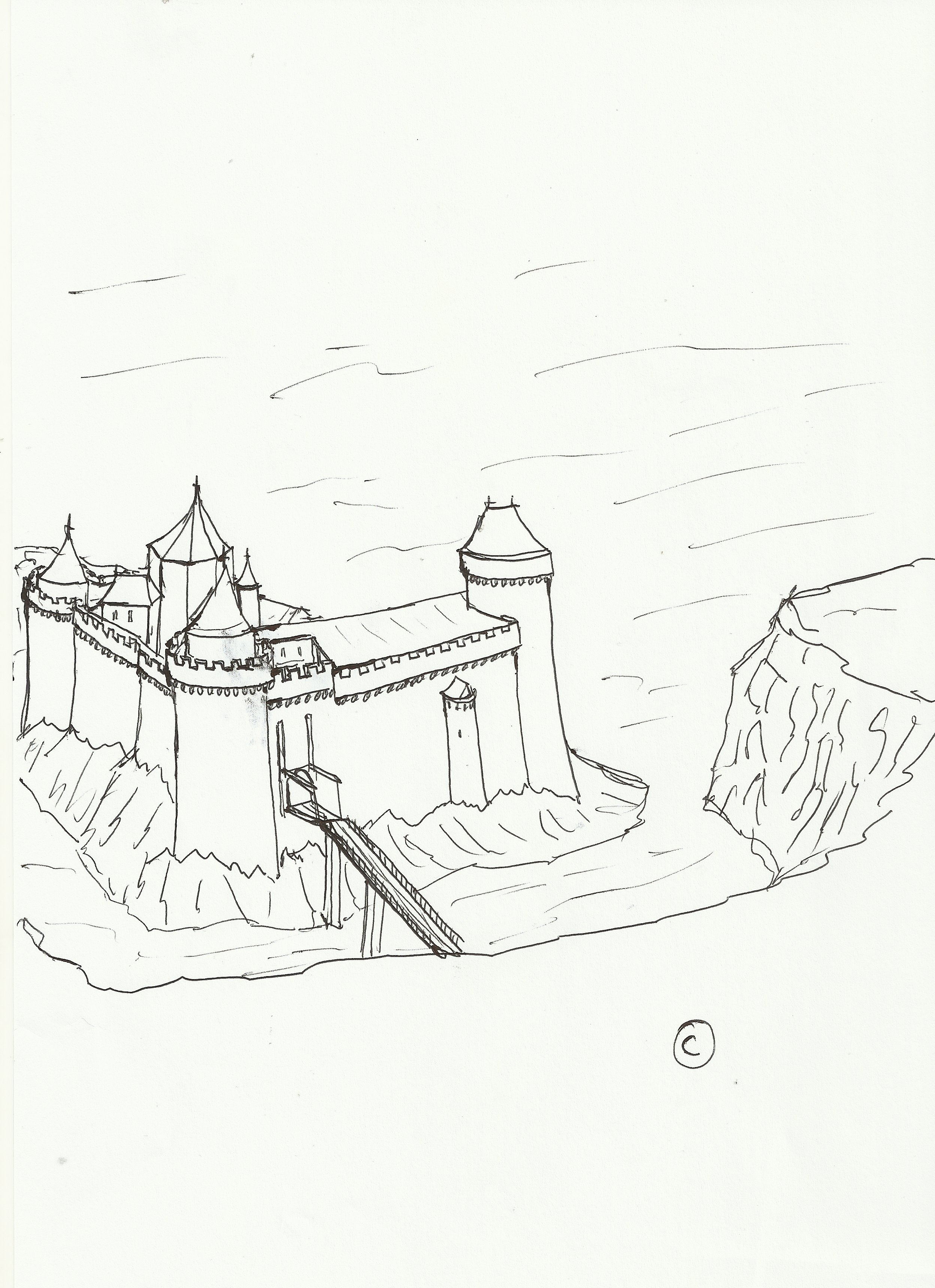 Essai de restitution du château de l'Ile d'Yeu au XIVe siècle.